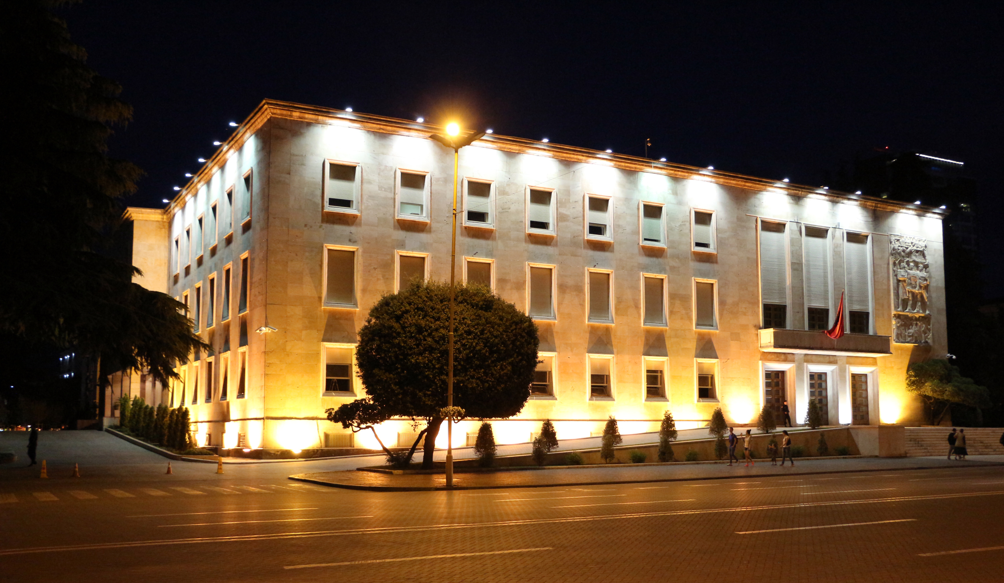 Kryeministria